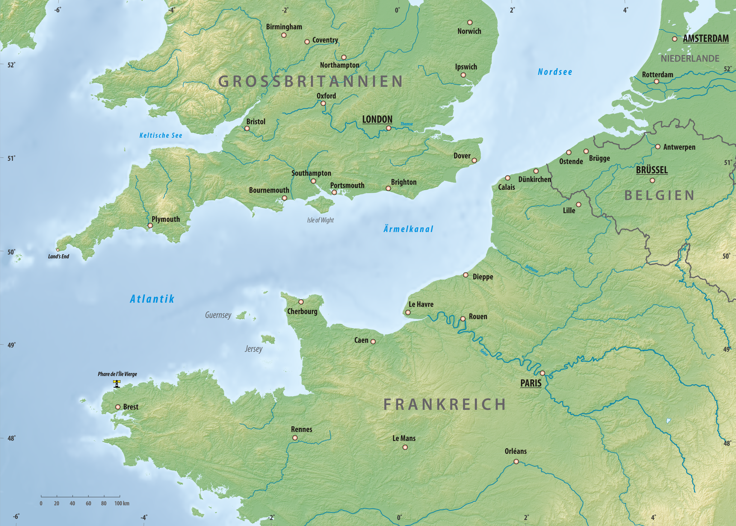 Ärmelkanal